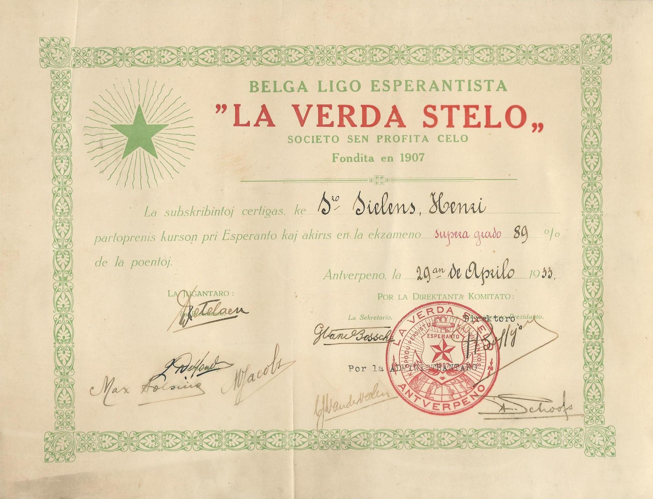 Diplomo Esperanto-kurso, 1933, FelixArchief 2233#231